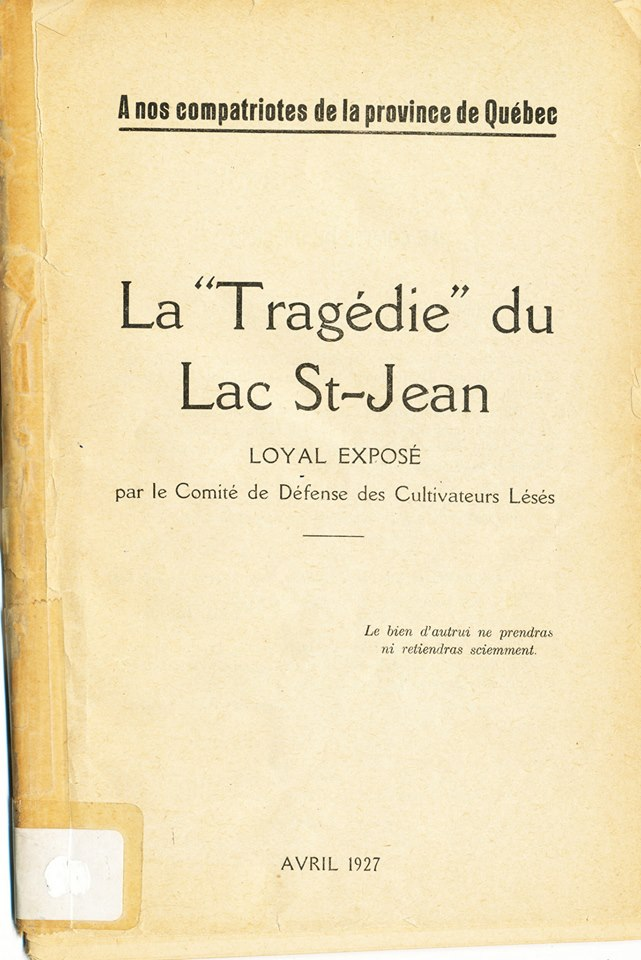 Page couverture de La Tragédie du Lac St-Jean, avril 1927